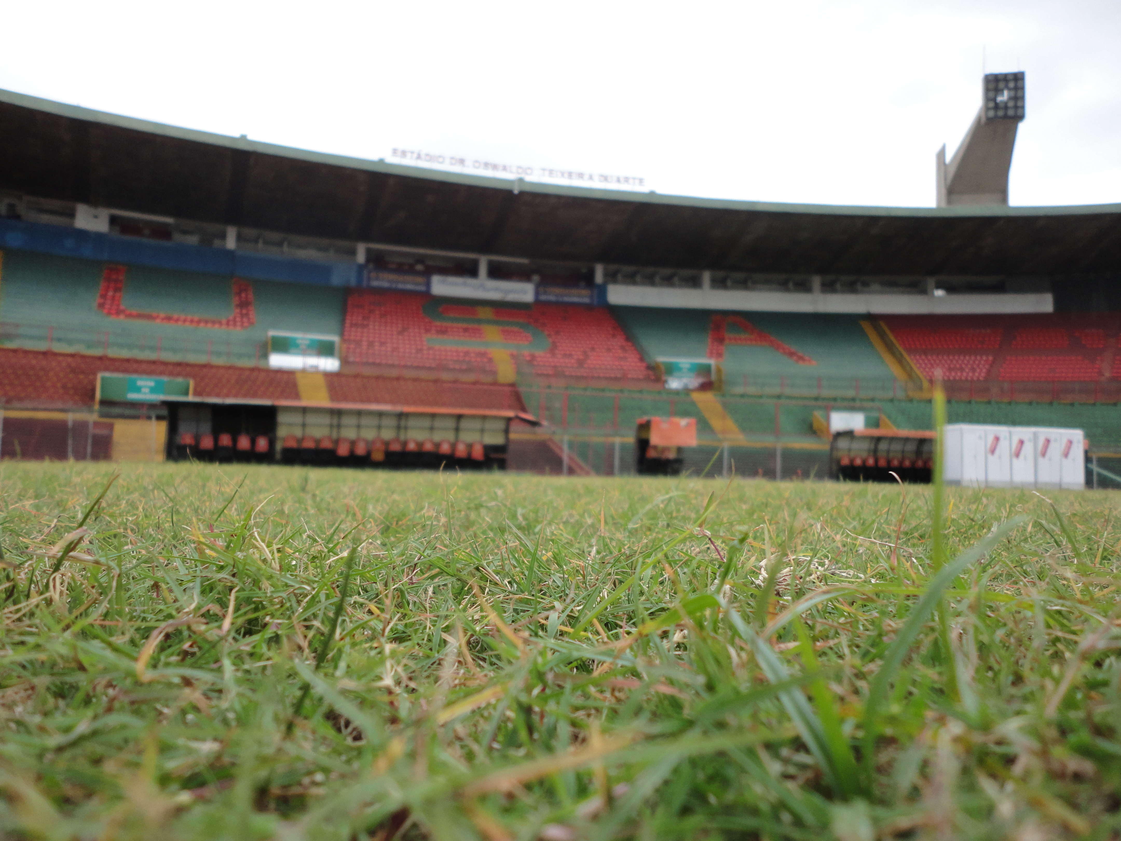 Vista do gramado do Canindé, em São Paulo, Brasil